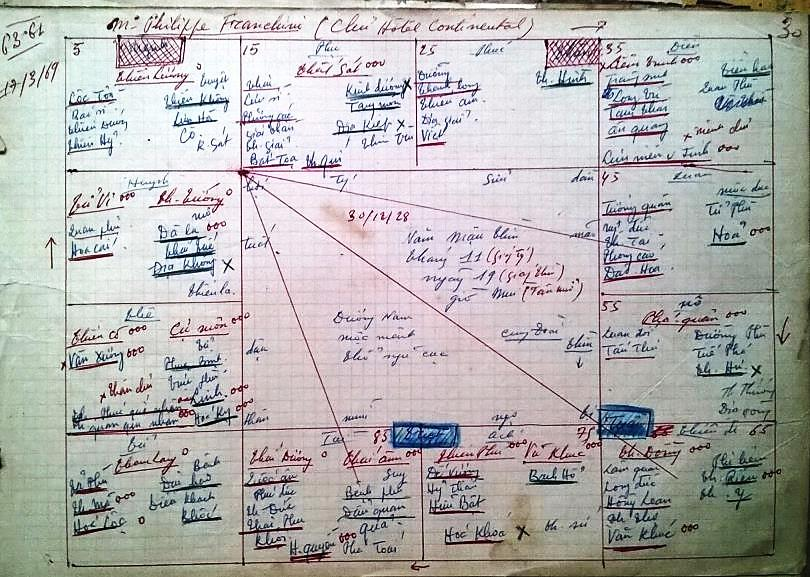 P. Franchini2